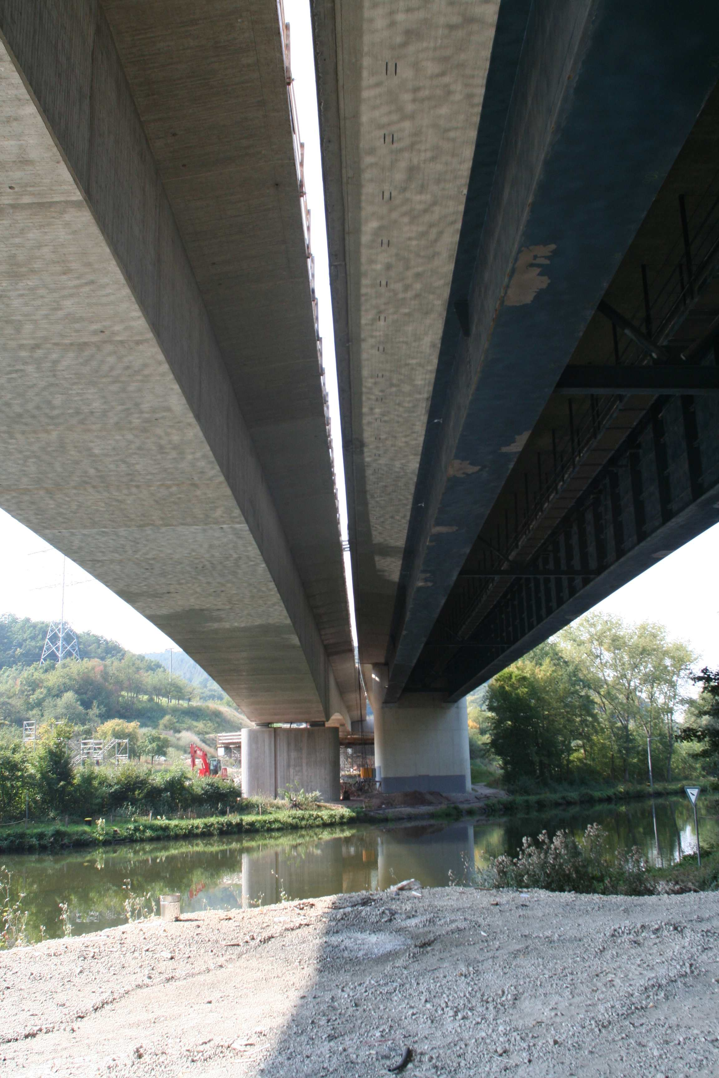 Mainbrücke Eltmann Bundesautobahn A70 bei Eltmann Brückenüber den Schleusenvorhafen, rechts Verbundbrücke, links Spannbetonbrücke